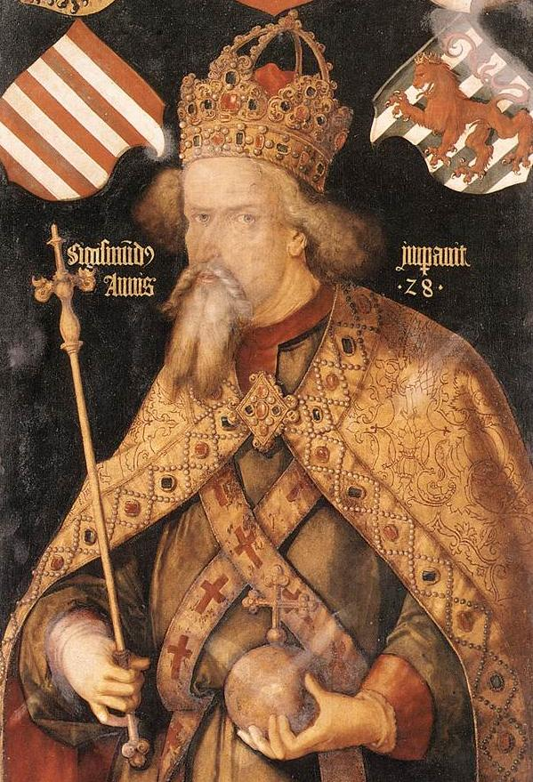 Sigismund Bild vum Albrecht Dürer vu 1513 Source: No der däitscher Wikipedia ass et "gemeinfrei"